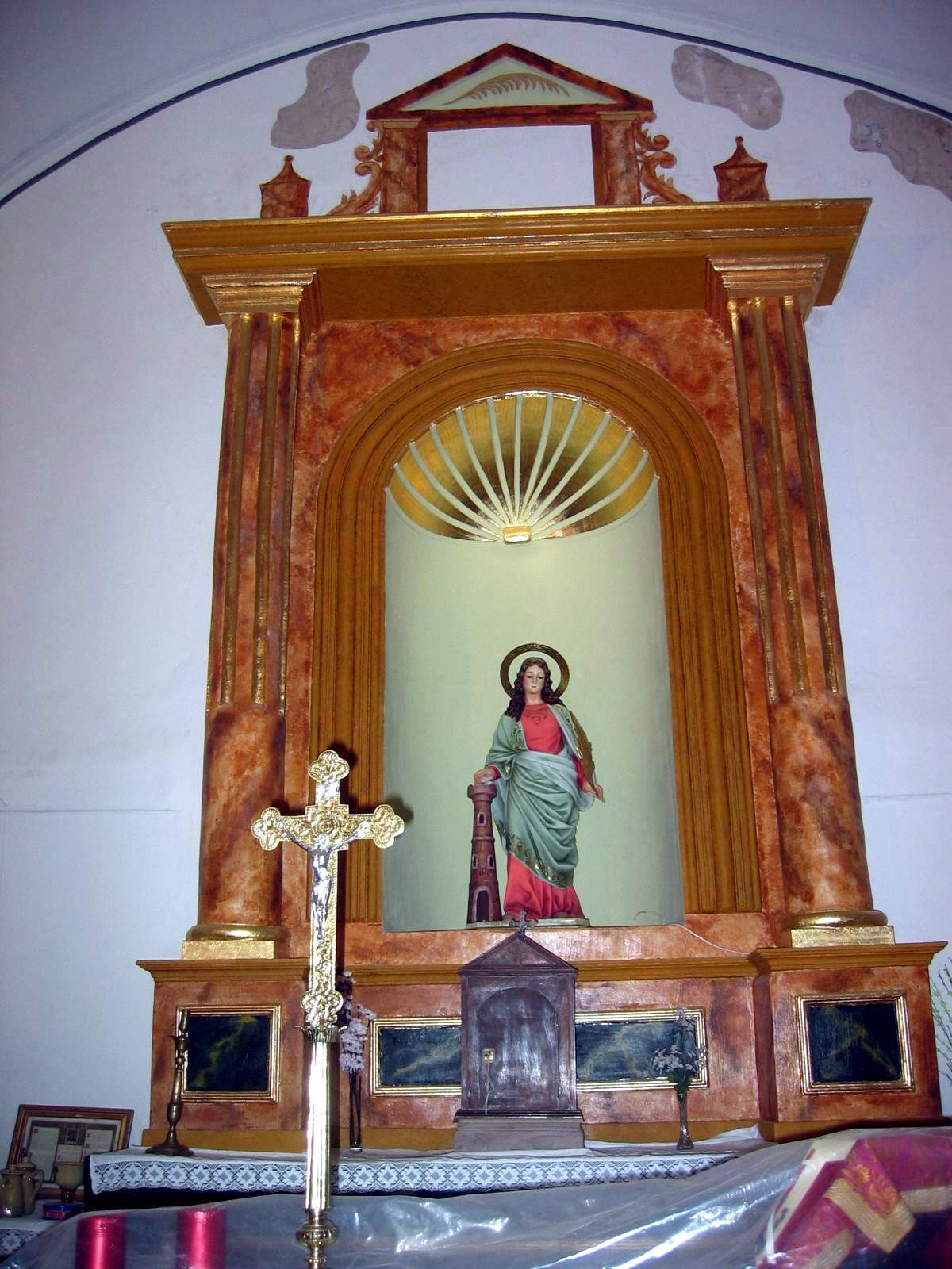 Detalle de la imagen de Santa Bárbara en Mas del Olmo, Ademuz (Valencia).